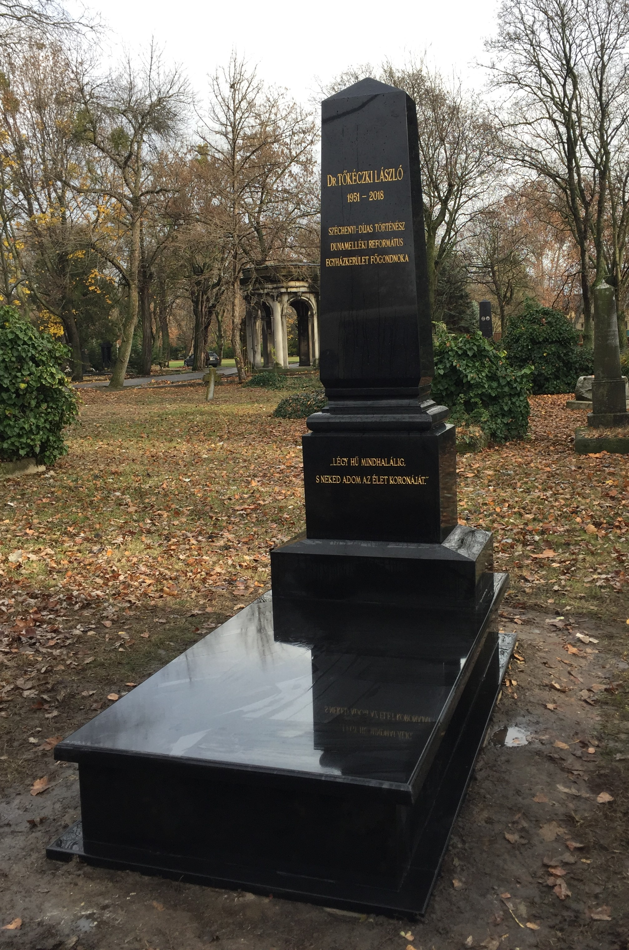 Tőkéczki László síremléke, Fiumei sírkert, Budapest